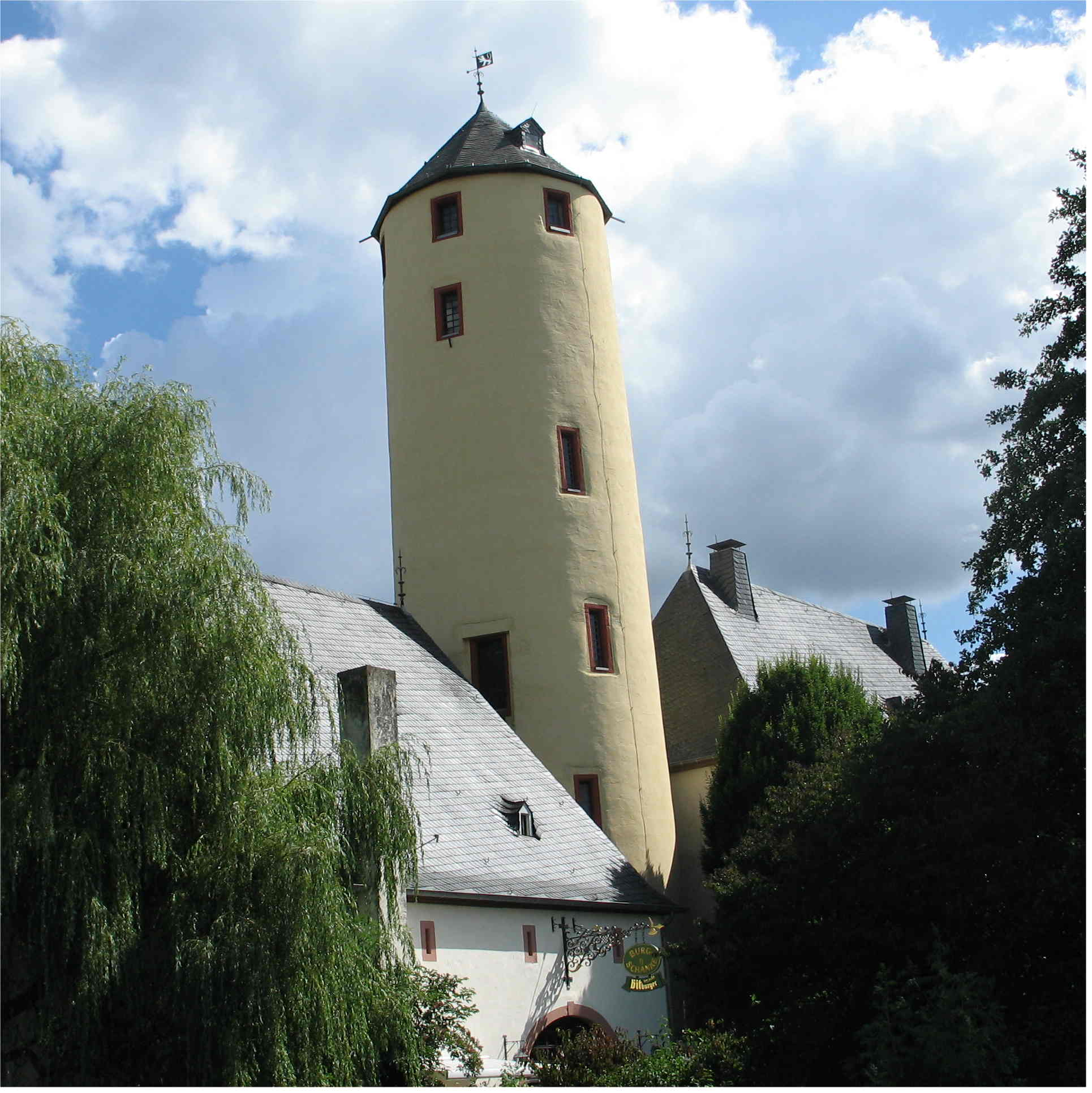 Buerg vu Rittersdorf